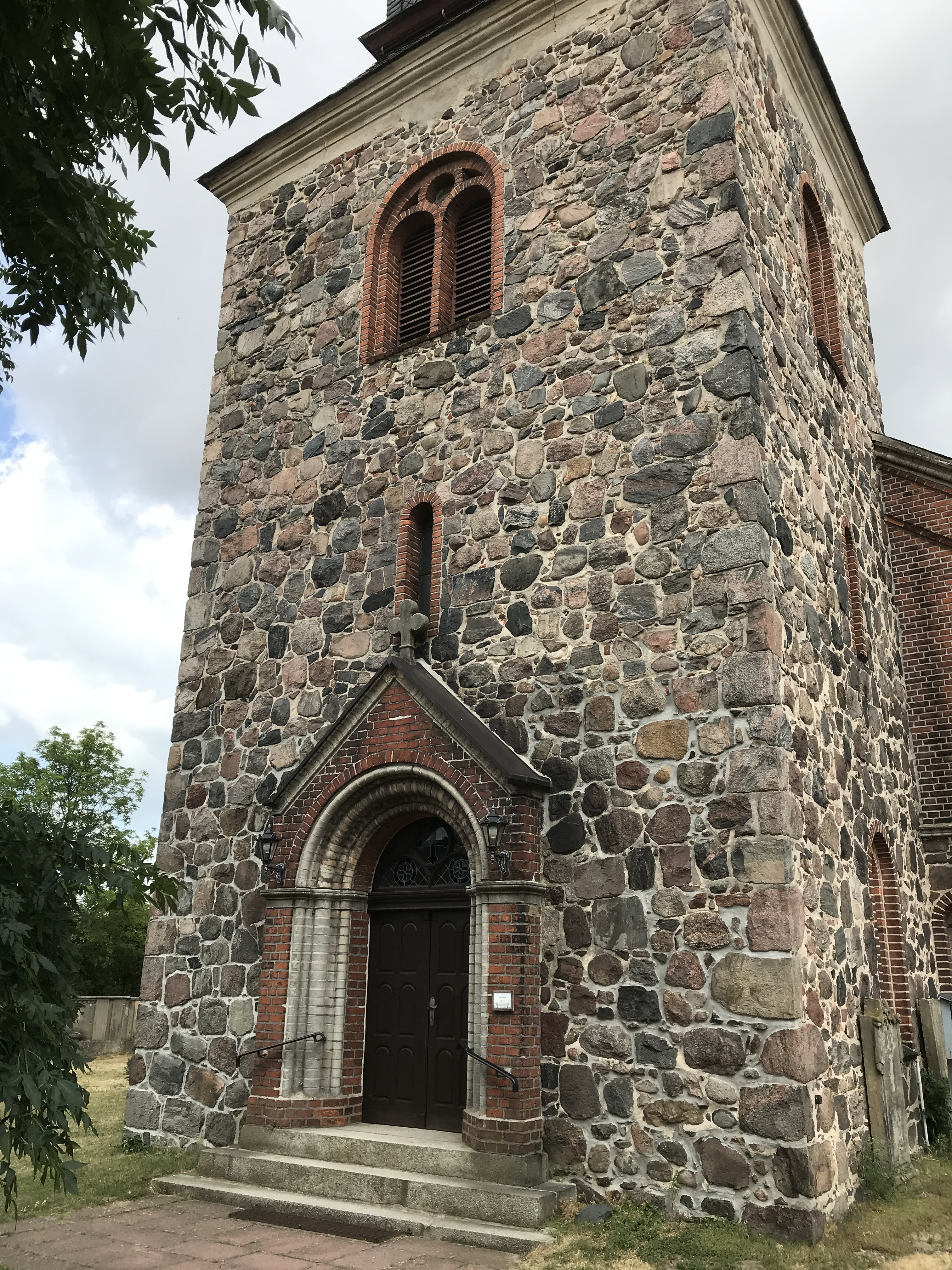 Die Dorfkirche Göhlsdorf der Gemeinde Kloster Lehnin entstand in den Jahren 1865 bis 1867 unter Einbeziehung des Turms des spätmittelalterlichen Vorgängerbaus. Die Kirchenausstattung stammt aus der Bauzeit.